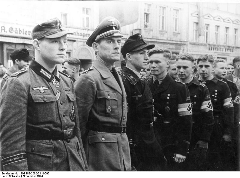 "Grossdeutschland"-Kriegsfreiwillige rücken ein UBz: Während der Übernahmefeier auf dem Marktplatz. Junge Männer aus allen deutschen Gauen meldeten sich als Kriegsfreiwillige. Links Ritterkreuzträger der Division "Grossdeutschland", die an der Feierstunde teilnahmen.